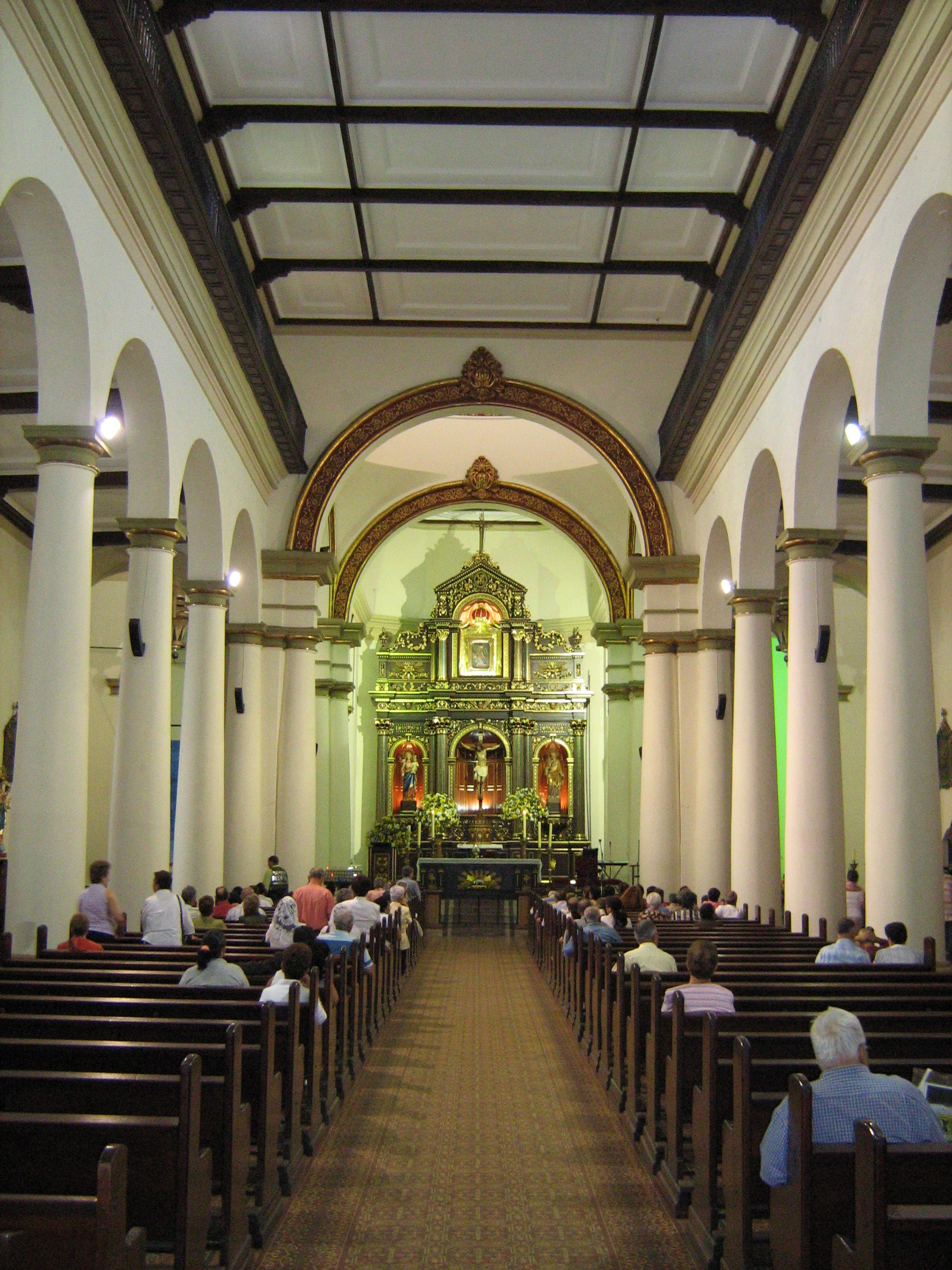 Iglesia Nuestra Señora de Belén, Barrio Belén, Medellín. Colombia